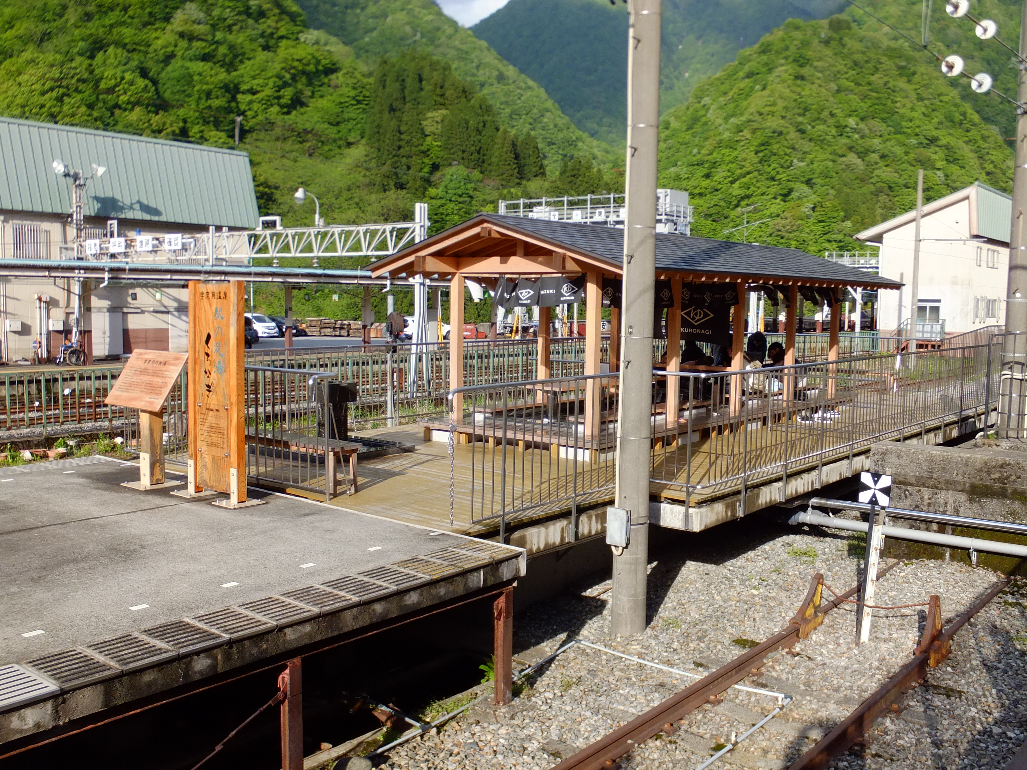 富山地方鉄道宇奈月温泉駅ホームにある足湯「駅の足湯くろなぎ」。水戸岡鋭治プロデュース